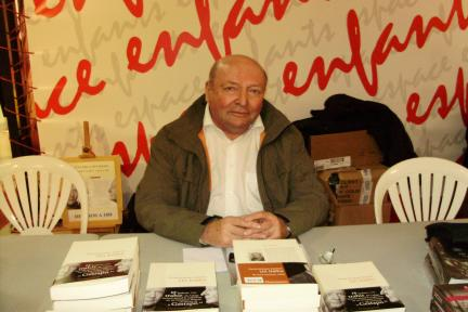 Le journaliste et écrivain Dominique Jamet en novembre 2008 au Salon du livre de Carcassonne.